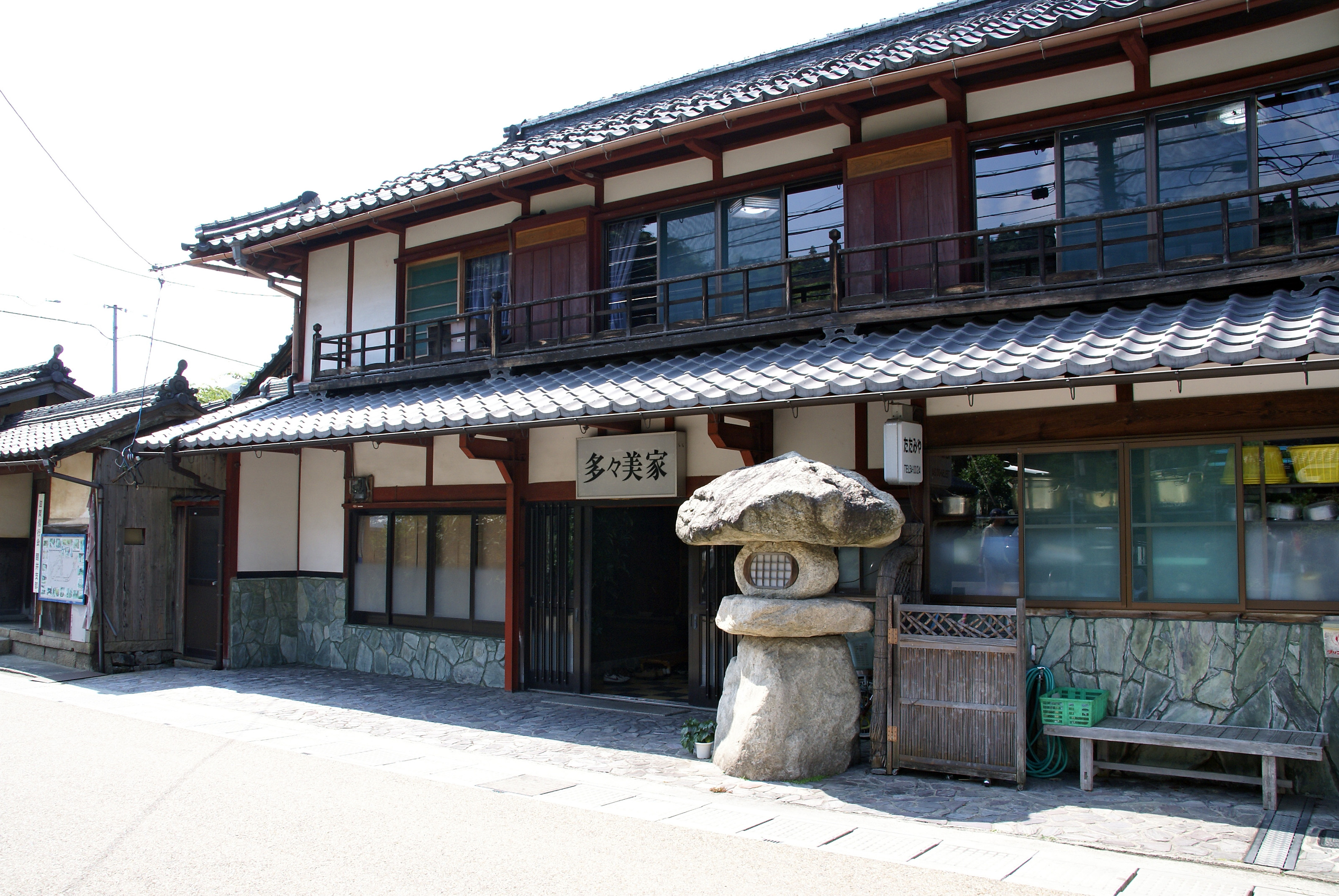 Samegai-juku in Maibara, Shiga prefecture, Japan